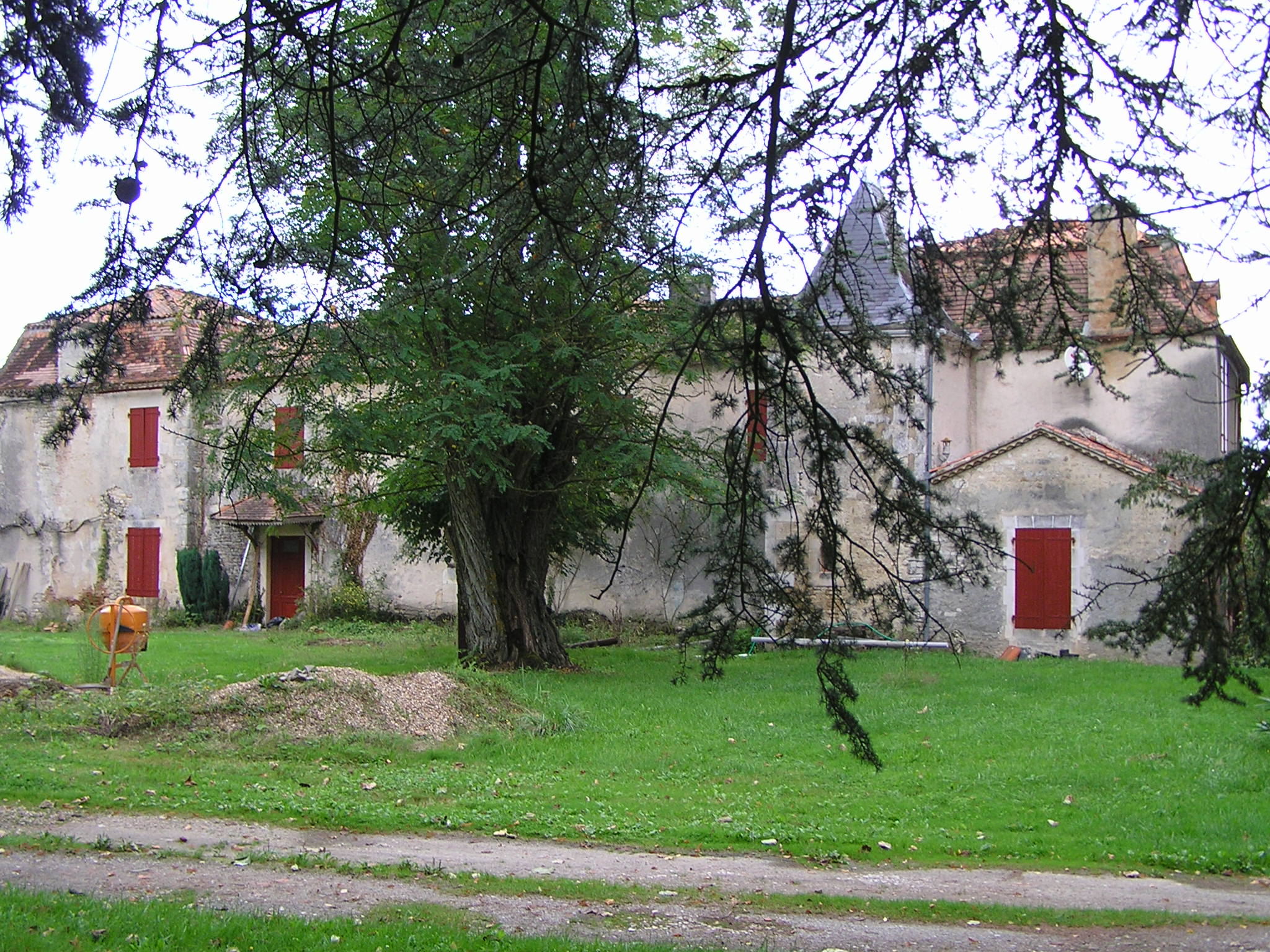 château Aignes-et-Puypéroux